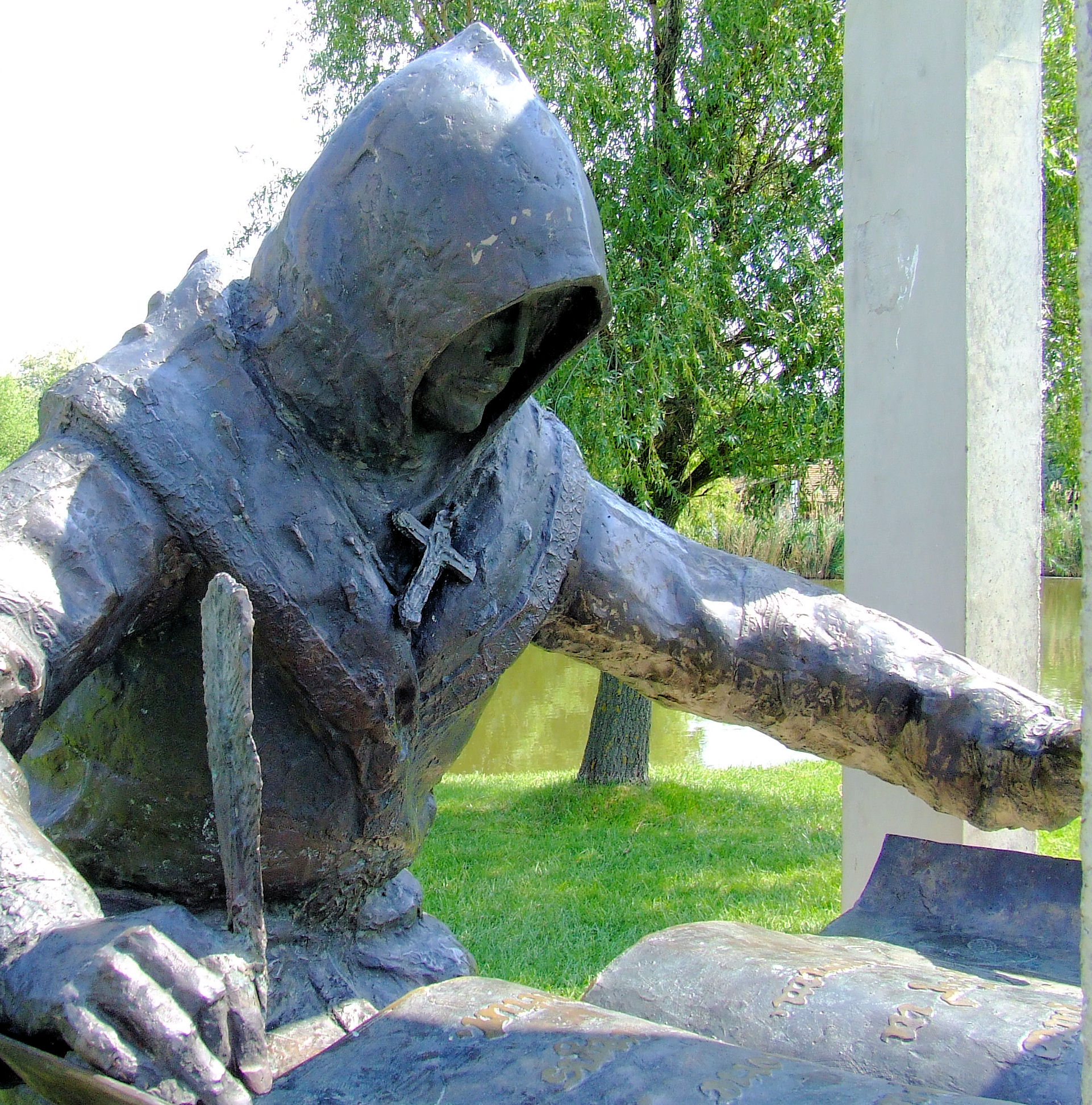 Anonymus szobra Ópusztaszeren. Mészáros Mihály alkotása (2001)